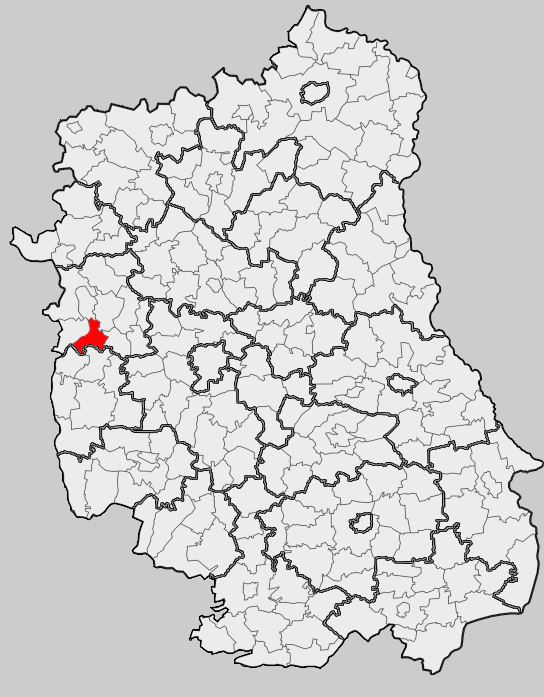 Map of gmina Kazimierz Dolny, Puławy county, Lublin voivodship Mapa gminy Kazimierz Dolny, powiat puławski, województwo lubelskie